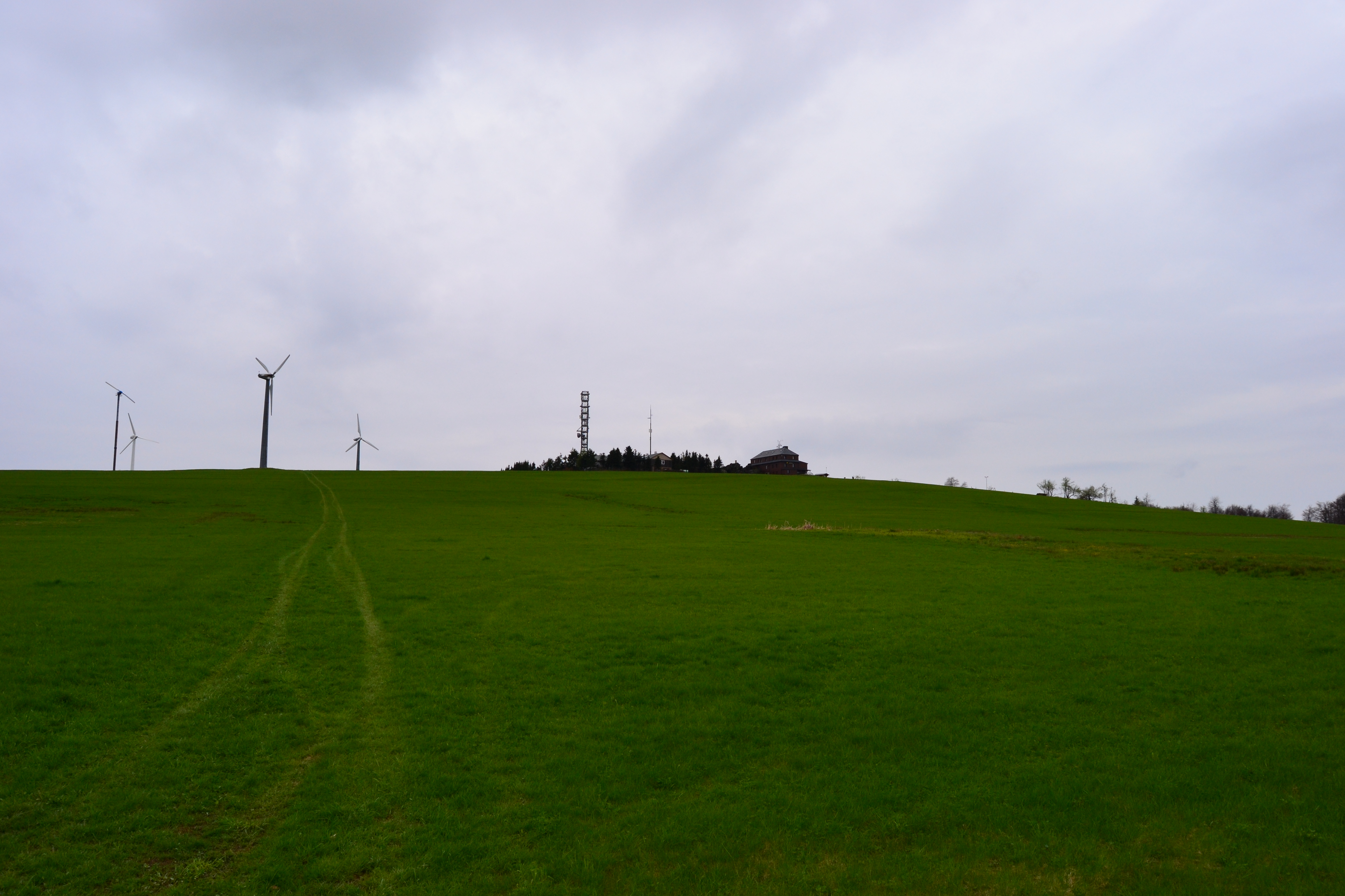 Der Hirtstein im Erzgebirge von Südosten gesehen